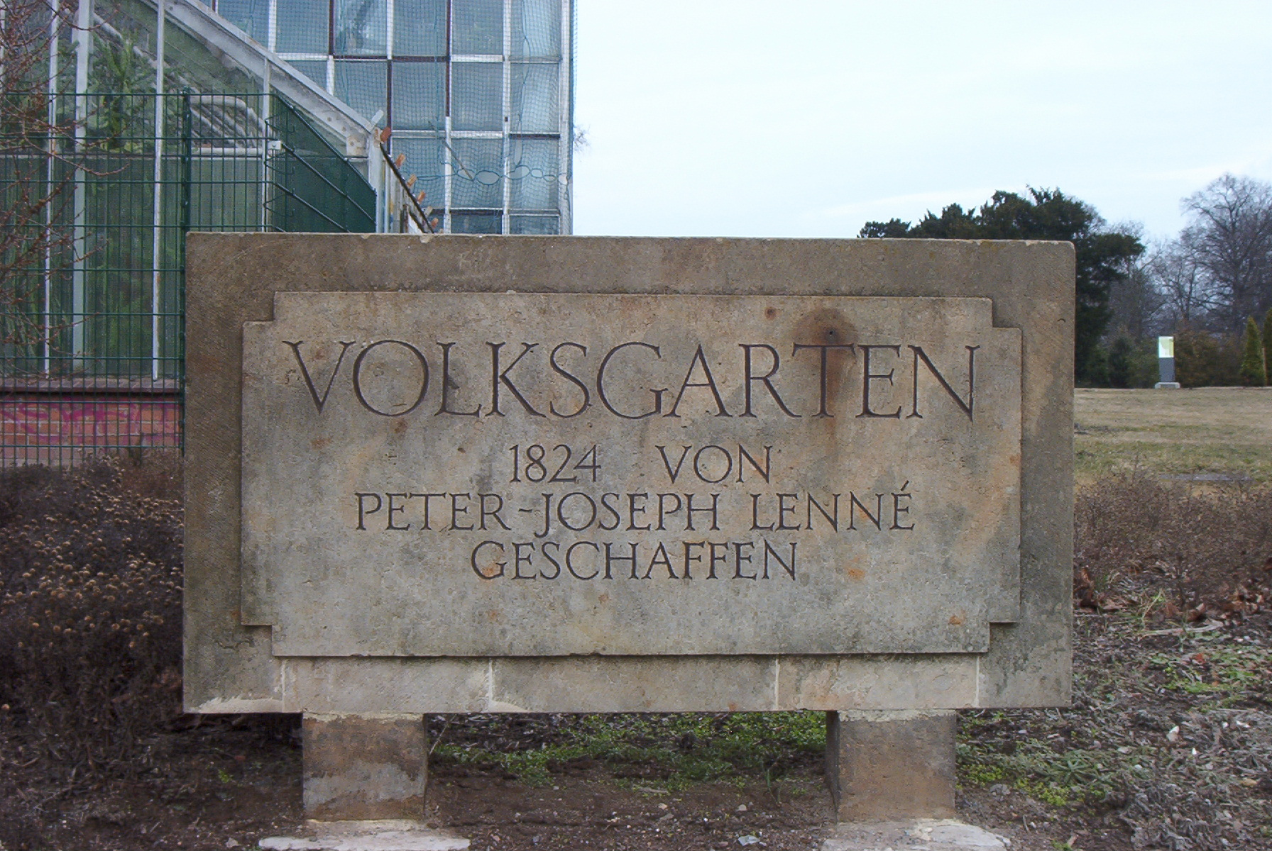 Klosterbergegarten Magdeburg, Eingangsschild; erstellt am 15.3.2005 durch Olaf2; erteilte Lizenz: GNU-FDL